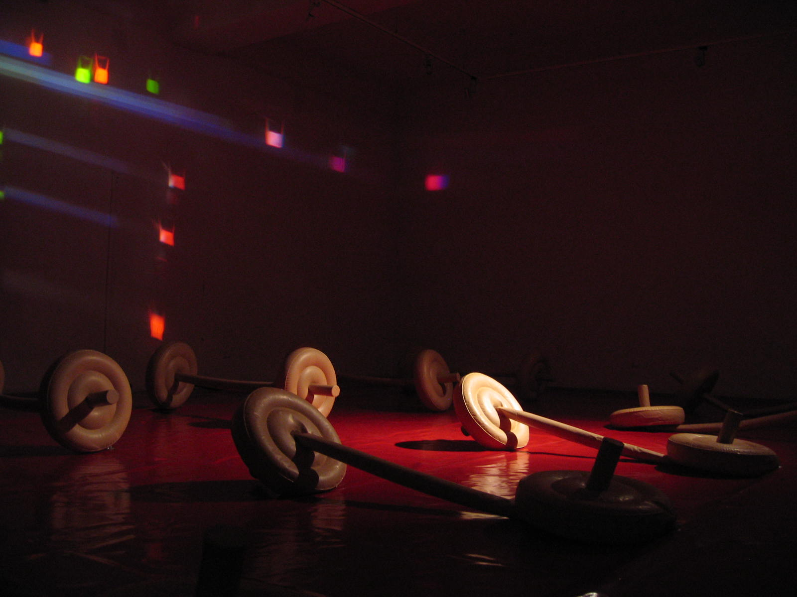 Fitness Galeria Awangarda Wroclaw